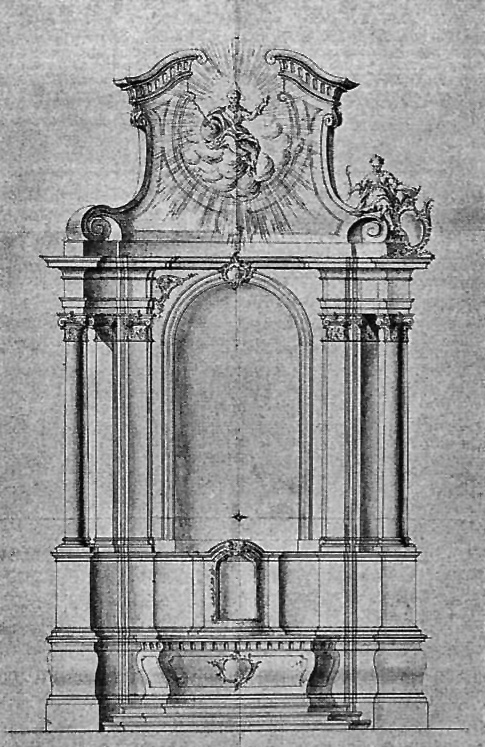 Sankt Gregorius im Elend, Köln. Präsentationsriss des Hochaltars um 1767/68